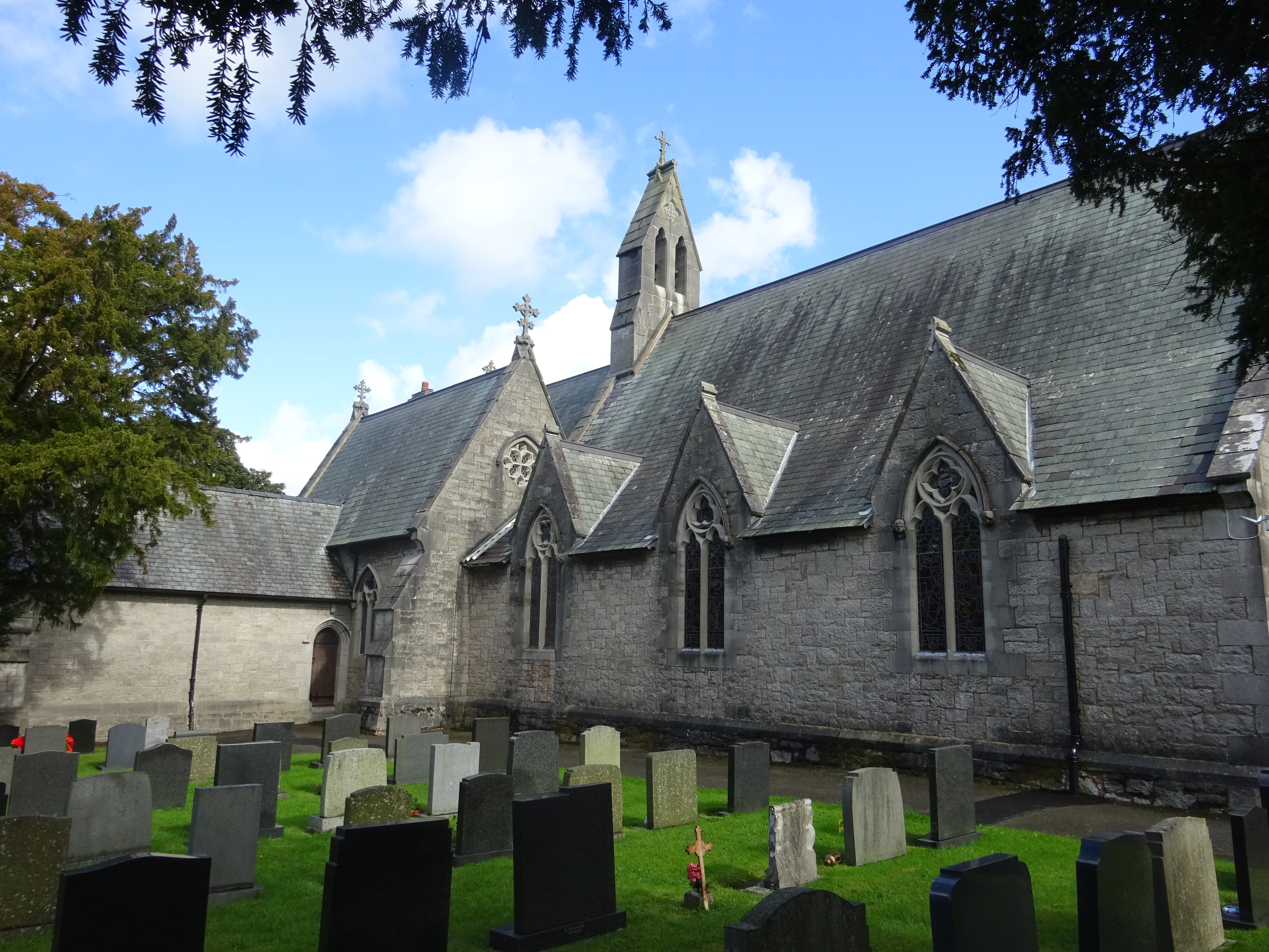 Eglwys y Drindod Sanctaidd, Trefnant, Sir Ddinbych. Gradd II*.